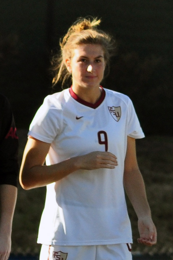 Kassey Kallman (Florida State Seminoles, 2013)